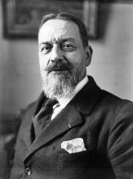 Madelin, député des Vosges et futur académicien [photographie de presse]